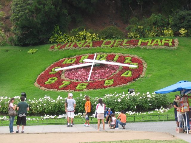 Blumenuhr - Reloj de Flores - Viña del Mar (Chile)